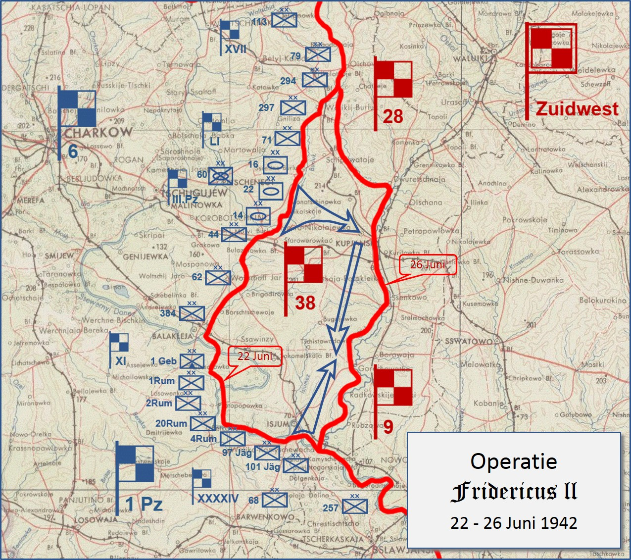 Verloop van Operatie Fridericus II in Juni 1942